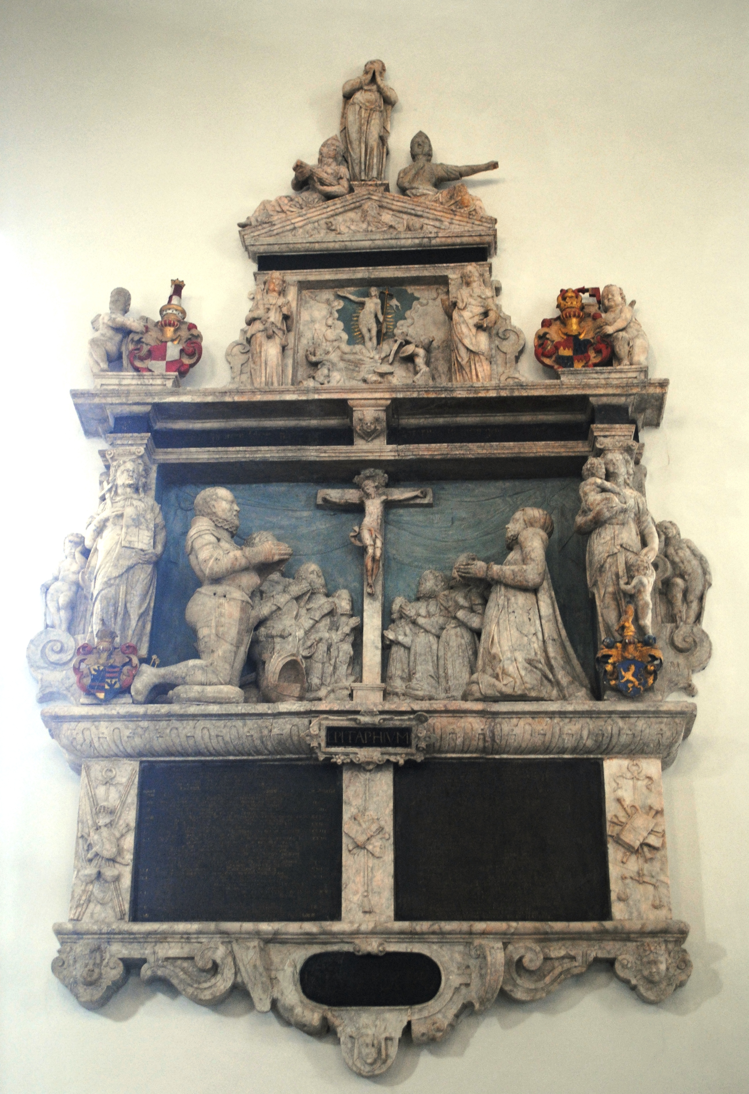 Epitaph, innen, Kirche, Rüdenhausen